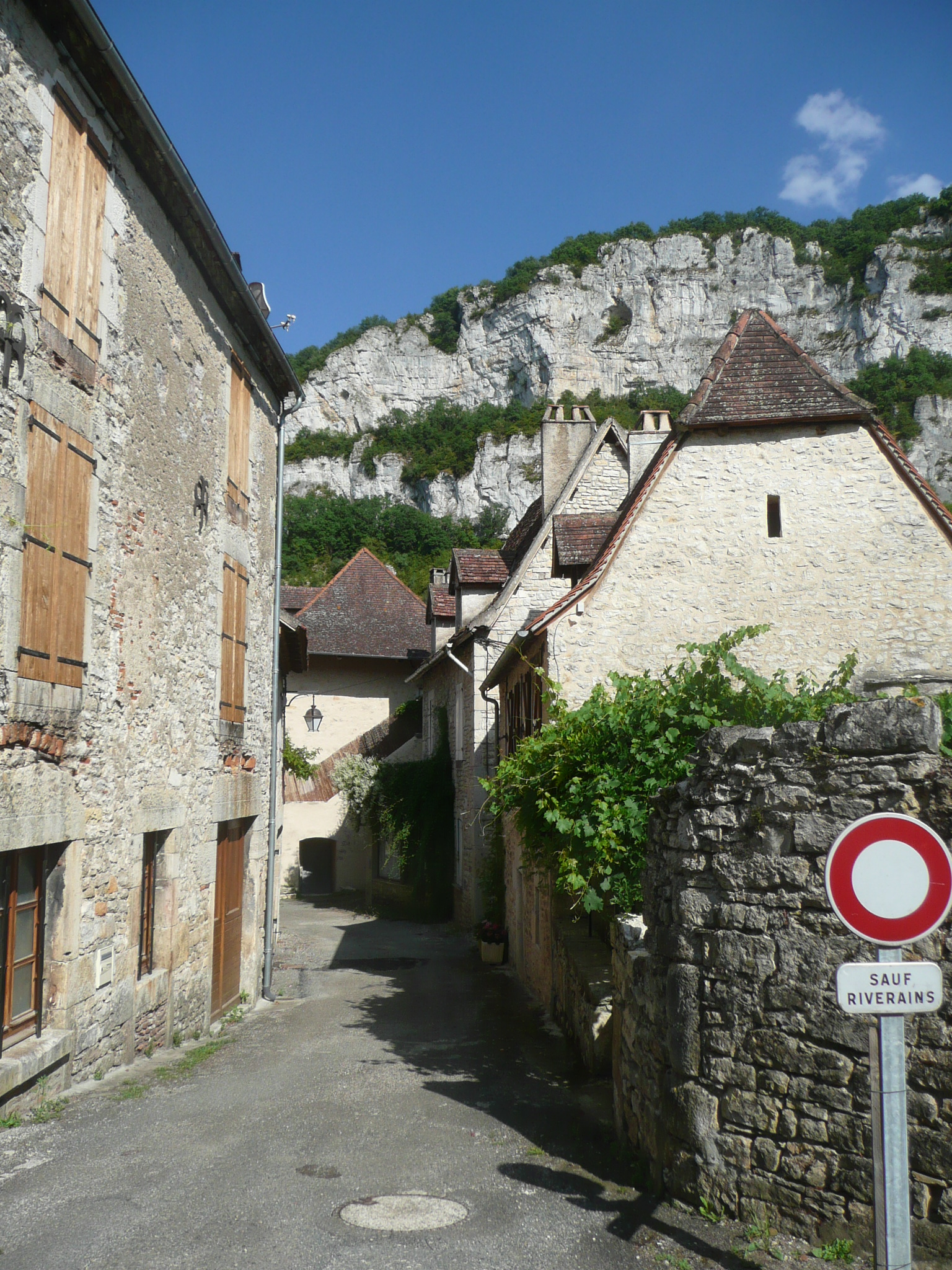 Une rue à Marcilhac-sur-Célé, Lot